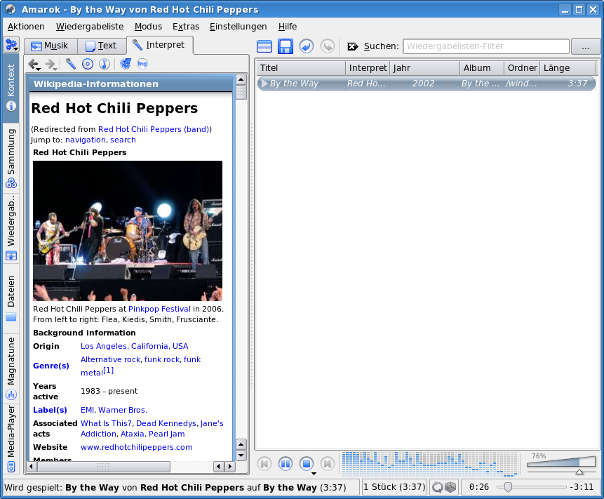 Amarok 1.4.5 mit Wikipedia-Inhalten